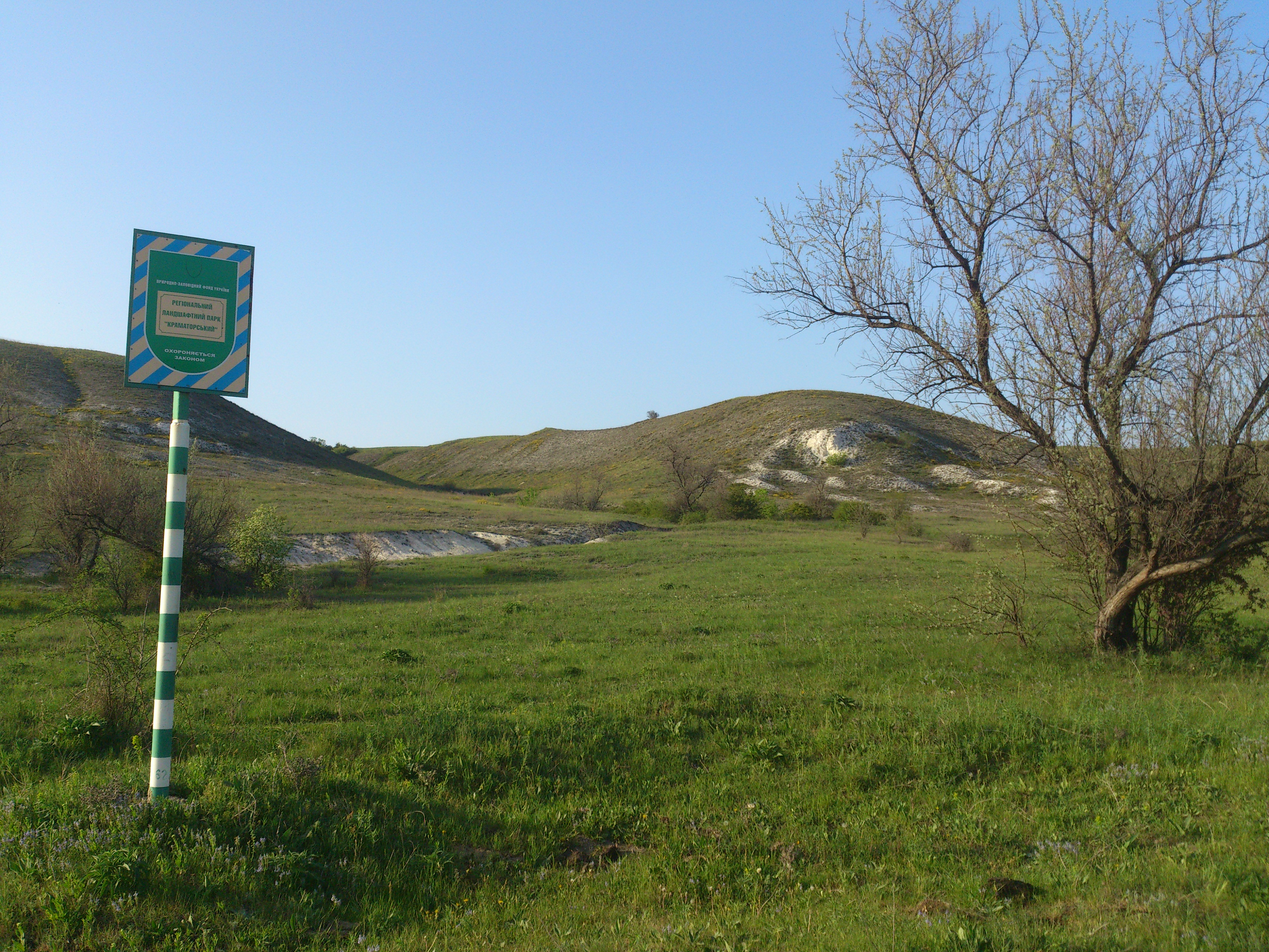 Краматорський, ділянка біля с. Білокузьминівка, цілинний степ, виходи крейдяних порід.